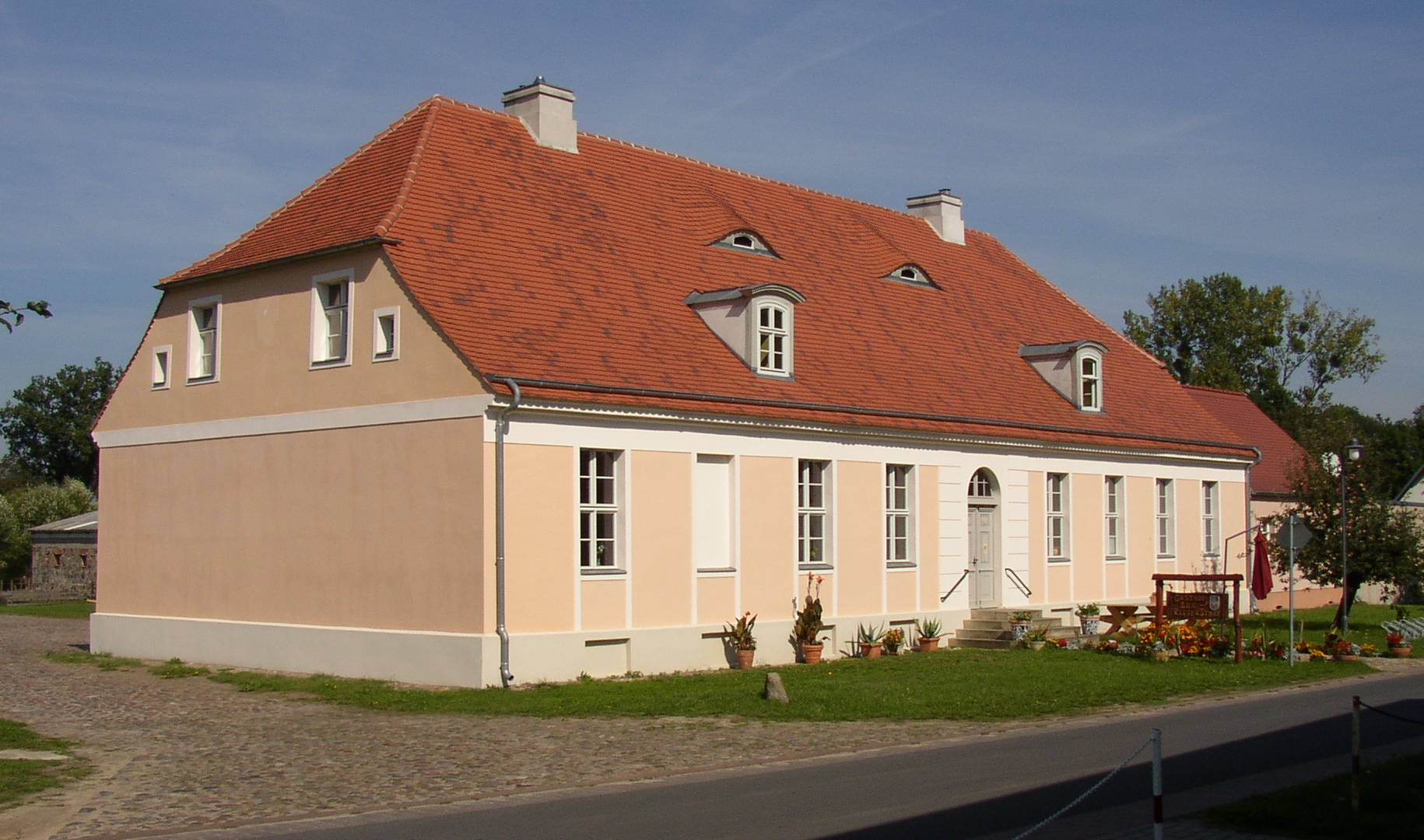 Inspektorenhaus des Guts Zernikow (Gemeinde Großwoltersdorf) in Brandenburg, Deutschland